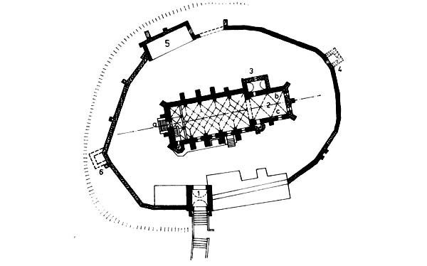 Planul ansamblului fortificatiei de la Bazna.